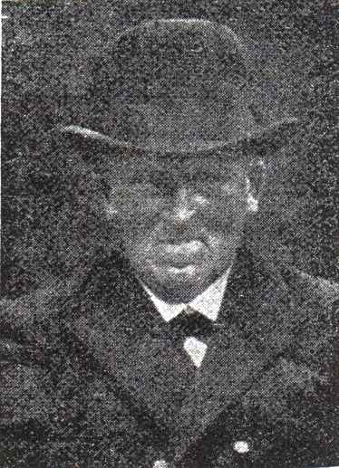 Wilhelm Weißbrodt (1836-1917), deutscher Altphilologe